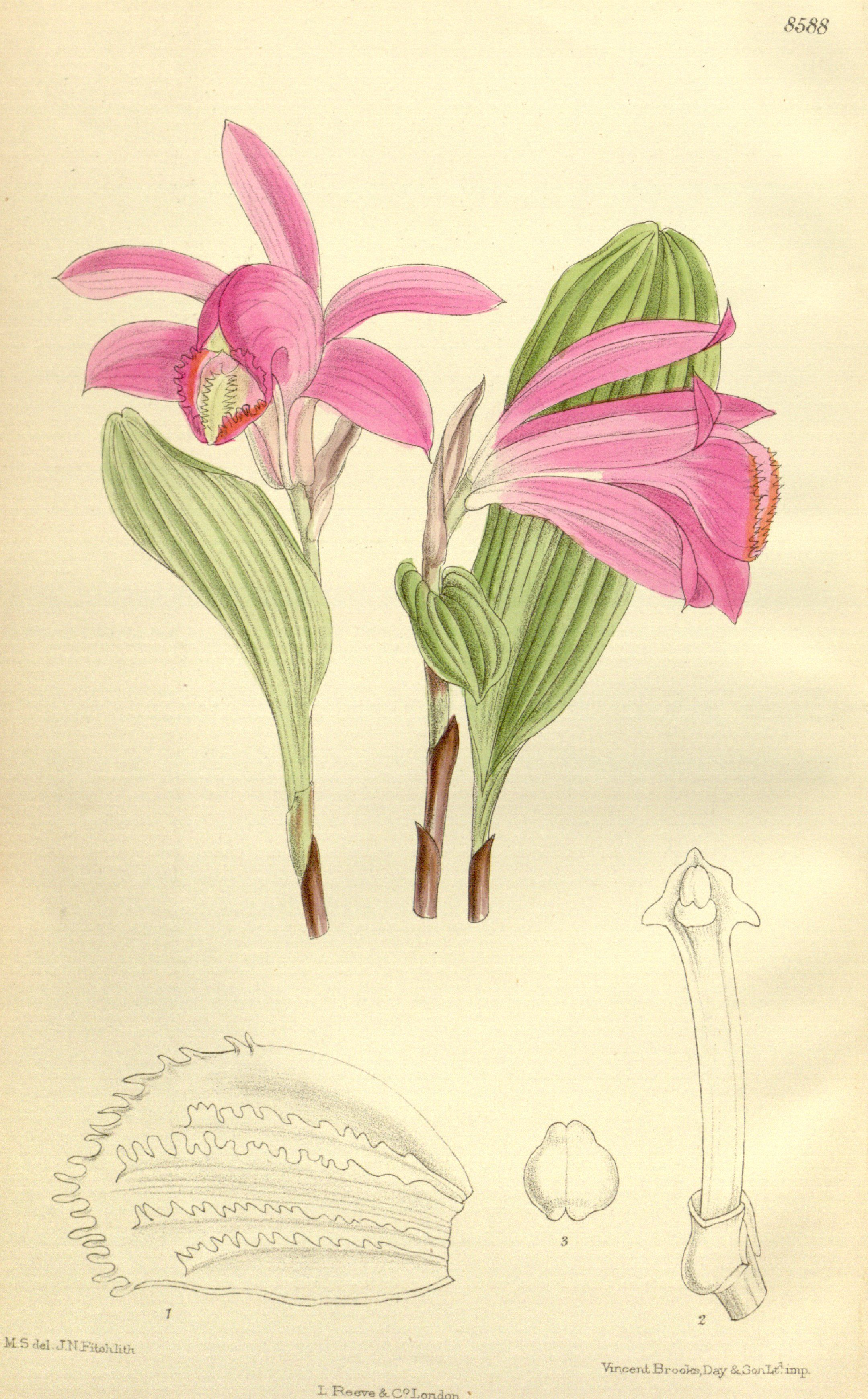 Pleione pogonioides (= Pleione bulbocodioides), Orchidaceae